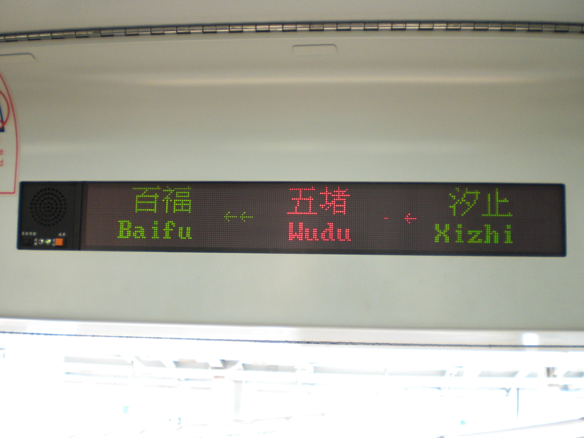 台鐵EMU700型電聯車的車內LED旅客資訊顯示器。